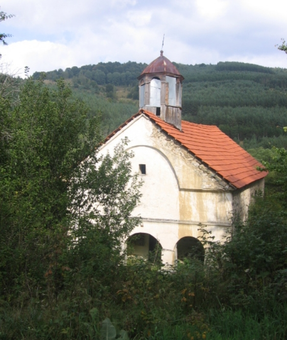 Црква - Топли Дол (Сурдулица).